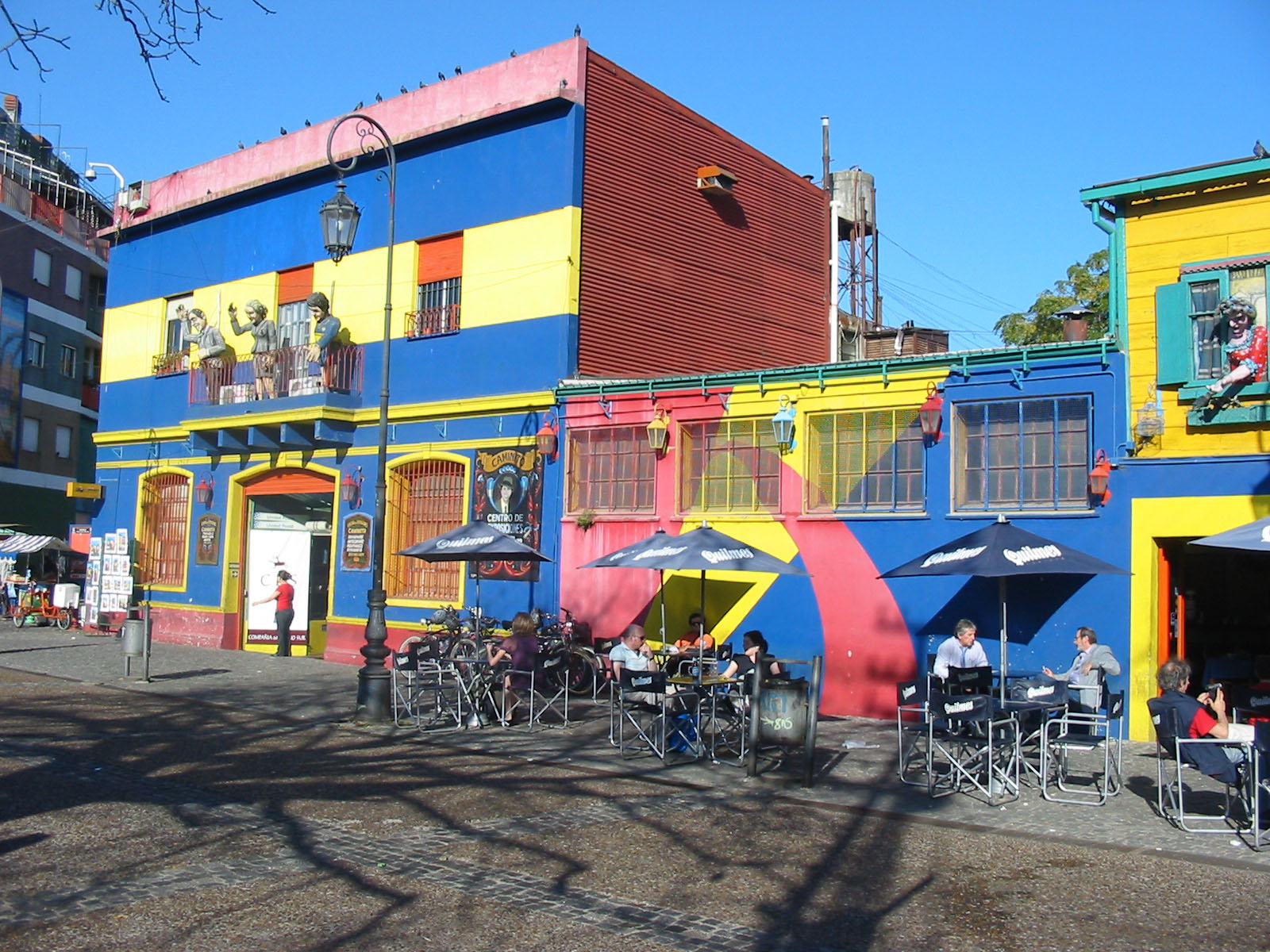 Calle Caminito. Barrio La Boca. Buenos Aires, Argentina.